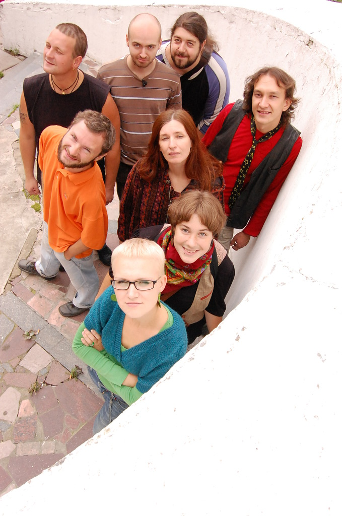 "Небослов"